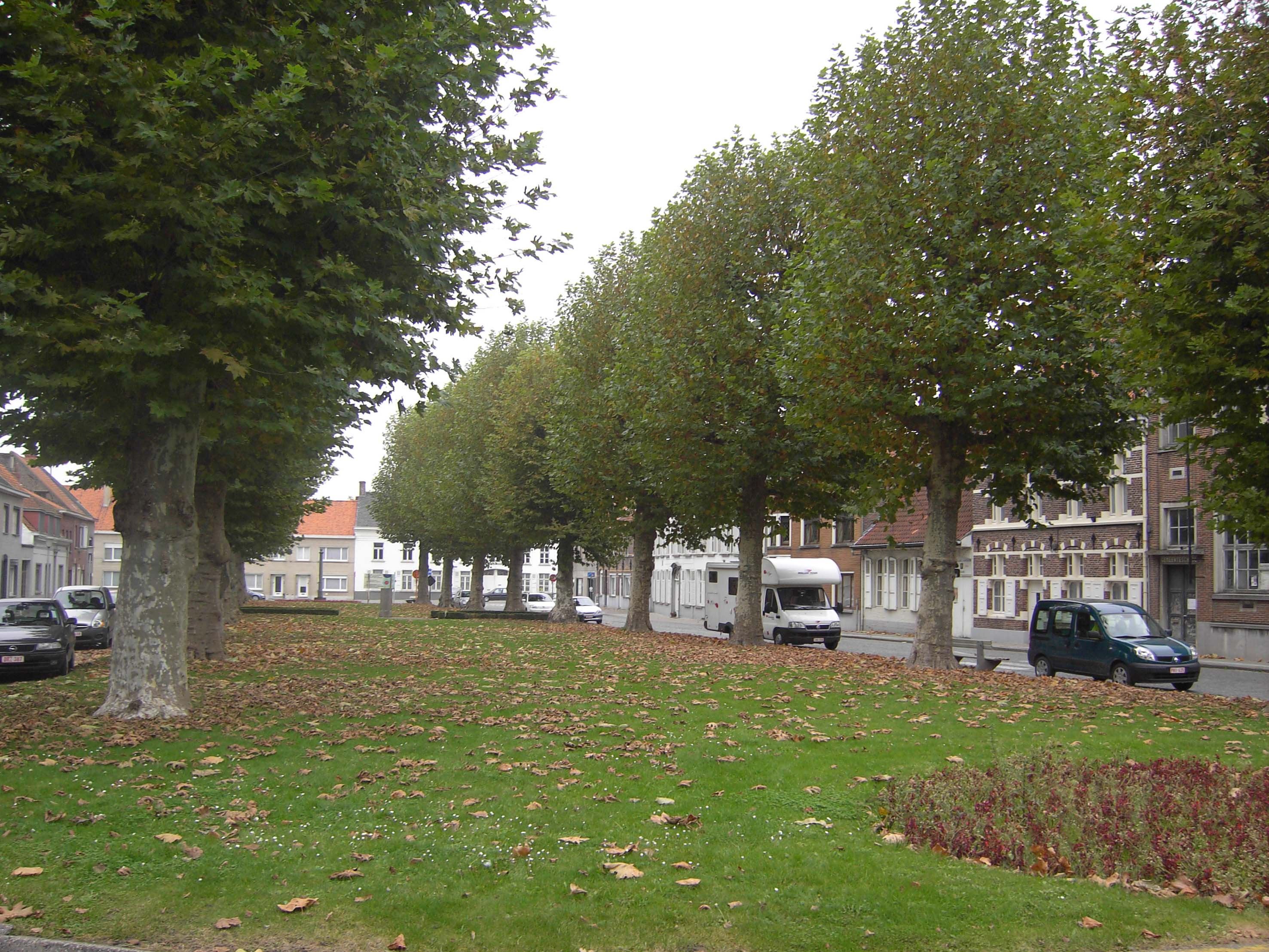 Ename (Oudenaarde) - dorpsplein